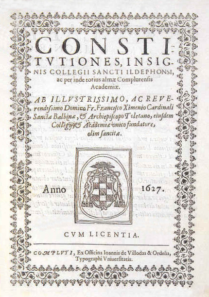 Constituciones de 1627 de la Universidad de Alcalá. Texto en latín. Fol. (29,5x21 cm.)